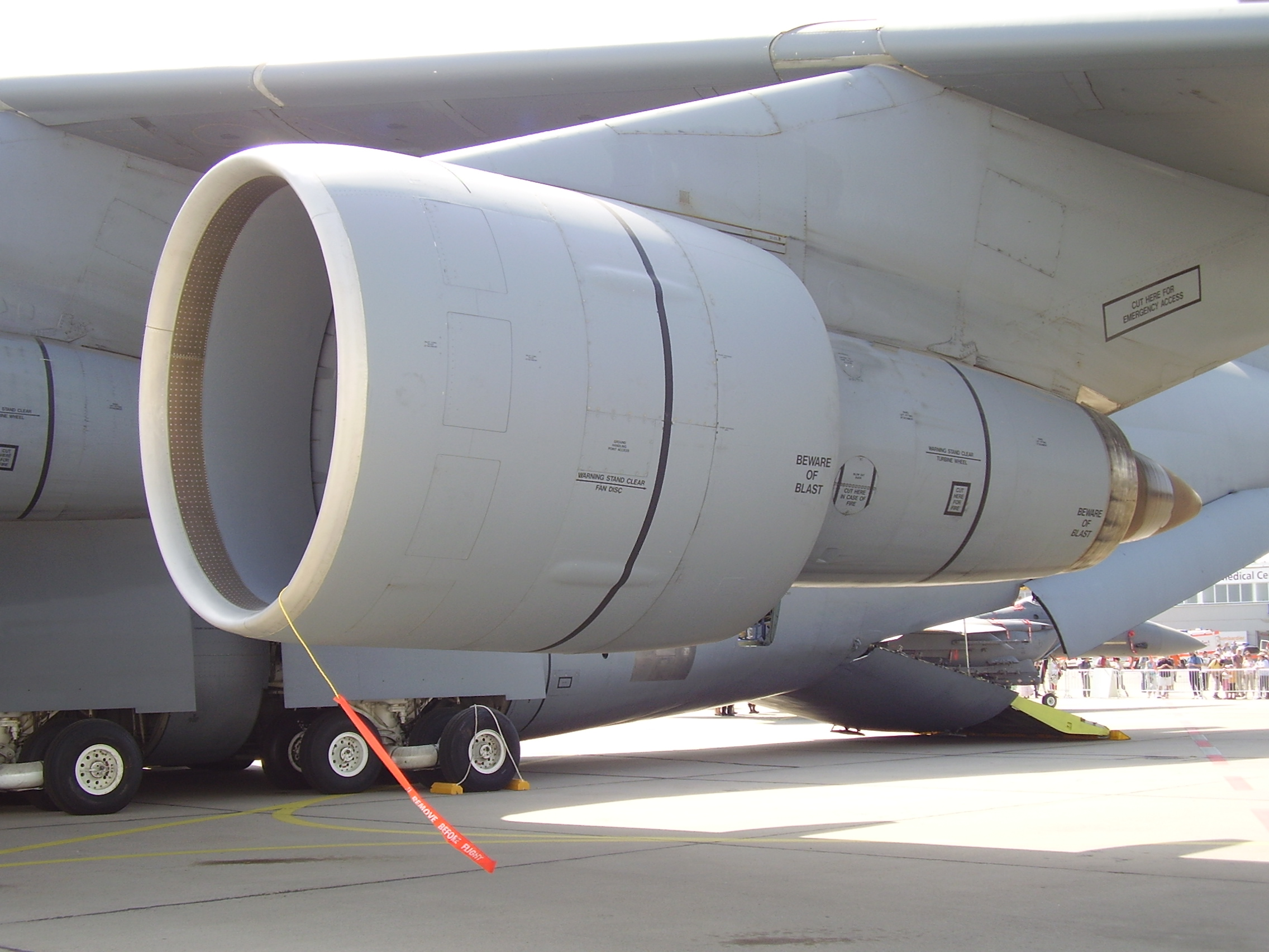 ILA 2008